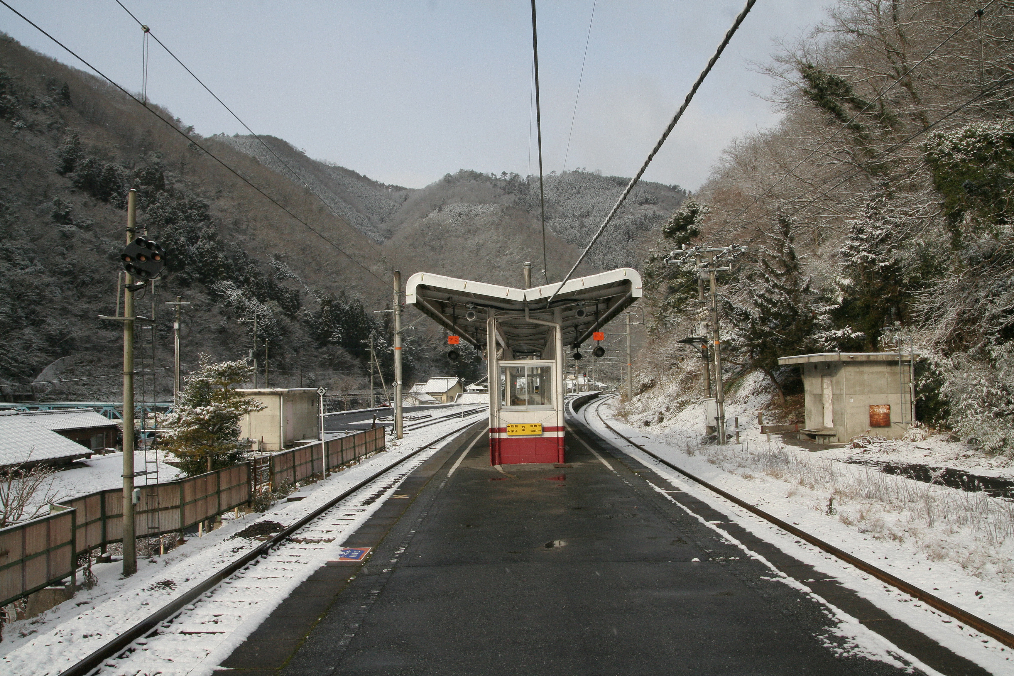 方谷駅の構内